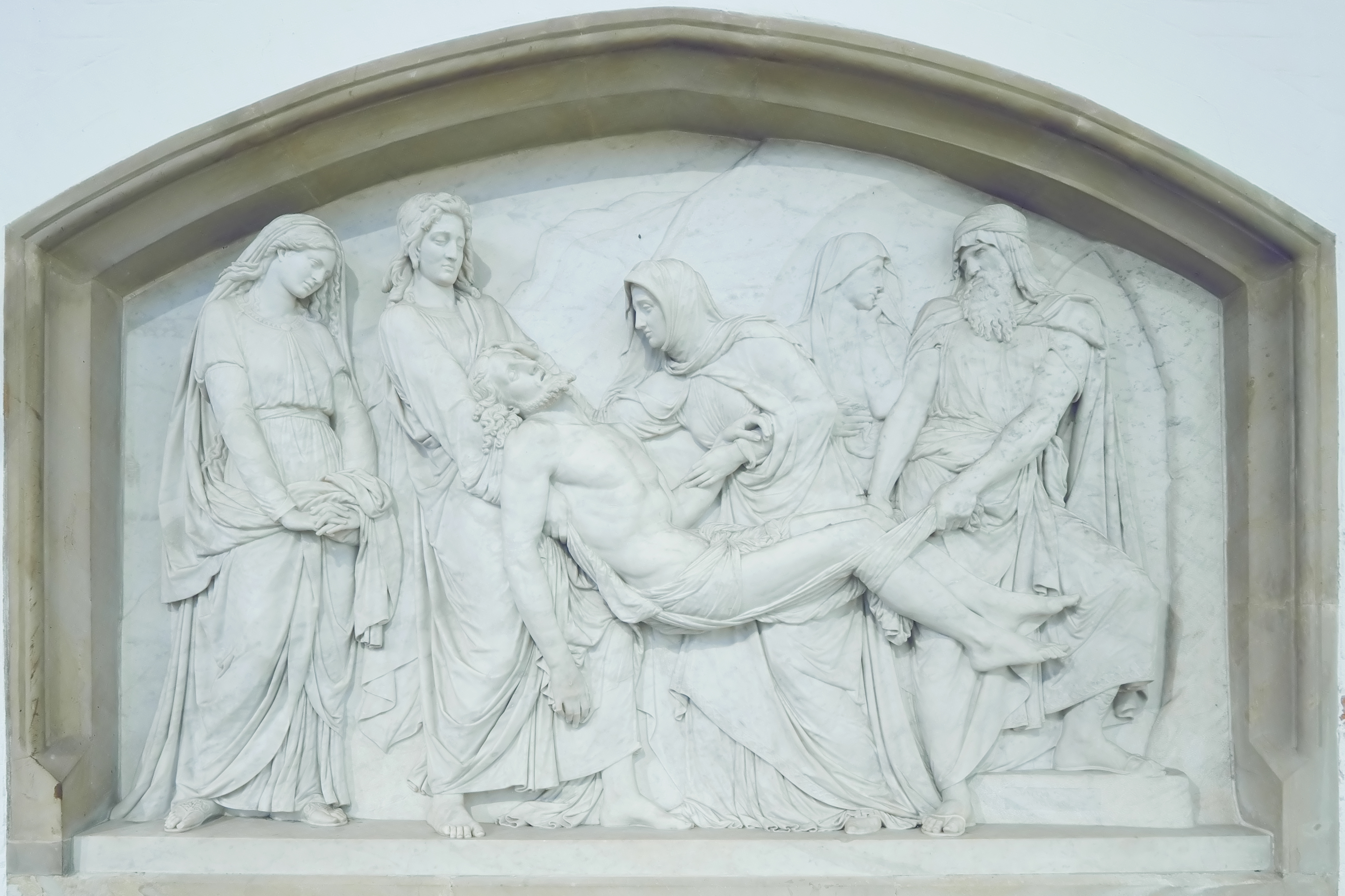 Grablegung Jesu, Marmorrelief von 1869, gestaltet durch den Bildhauer Hermann Schubert, Hauptkirche Sankt Petri (Hamburg) in Hamburg.